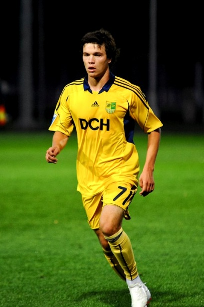 Сергей Ткачёв в составе харьковского «Металлиста»